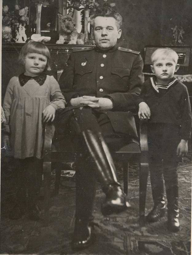 Фролов І.Ф. з дітьми